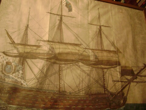 "Le Terrible vaisseau François de 110 Piéces de canon construit à Toulon en 1780"